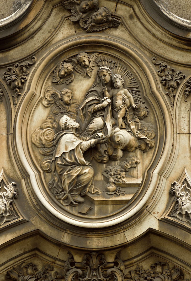 Medalhão lisboeta confeccionado em mármore de liós. Igreja da Venerável Ordem Terceira do Monte do Carmo, no Centro da cidade do Rio de Janeiro.